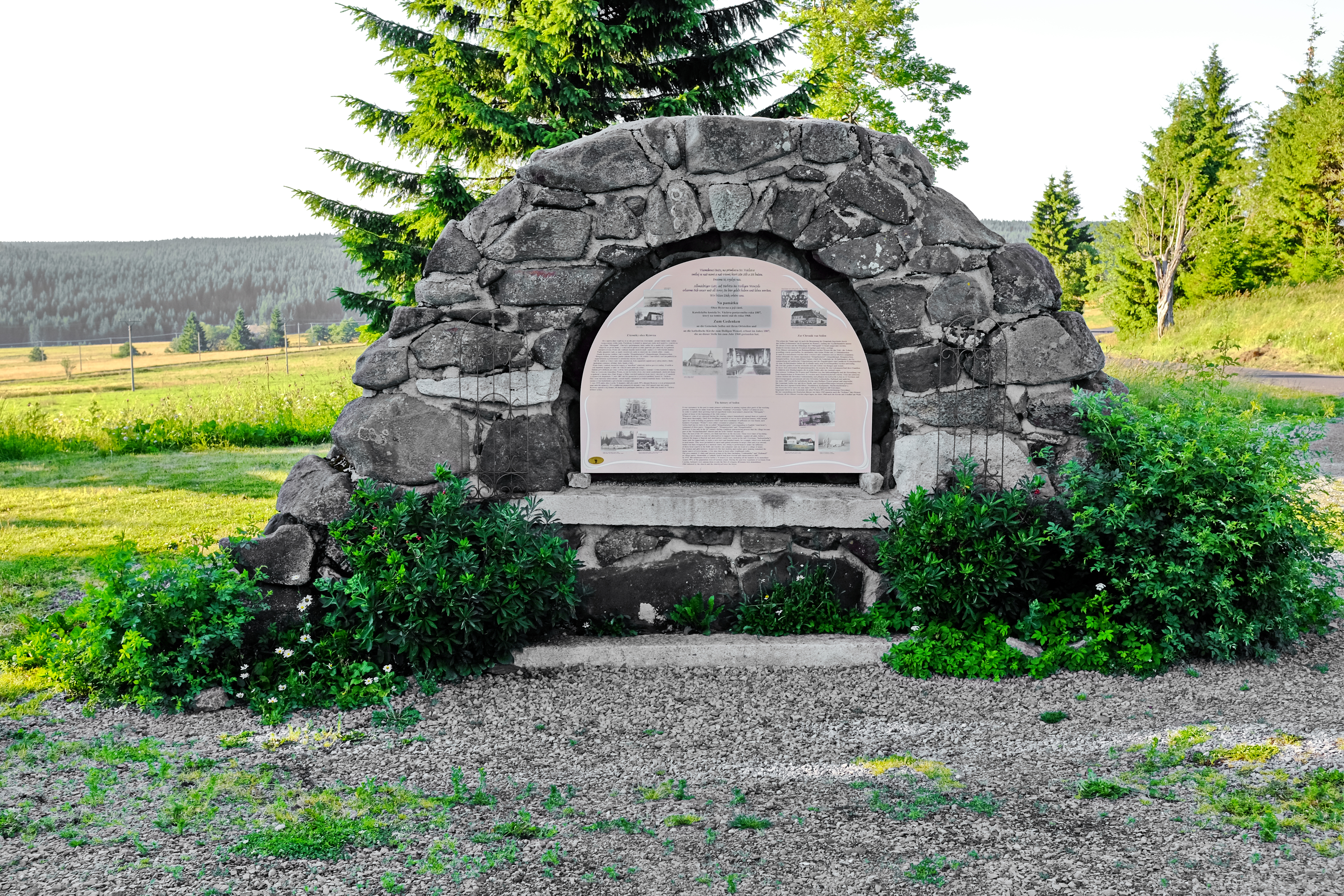 Ryžovna, zaniklá obec v Krušných horách, památník zaniklé obcee v místě zaniklého kostela, okres Karlovy Vary